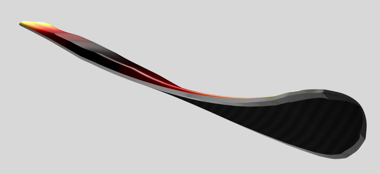 Demonstration of ski flex